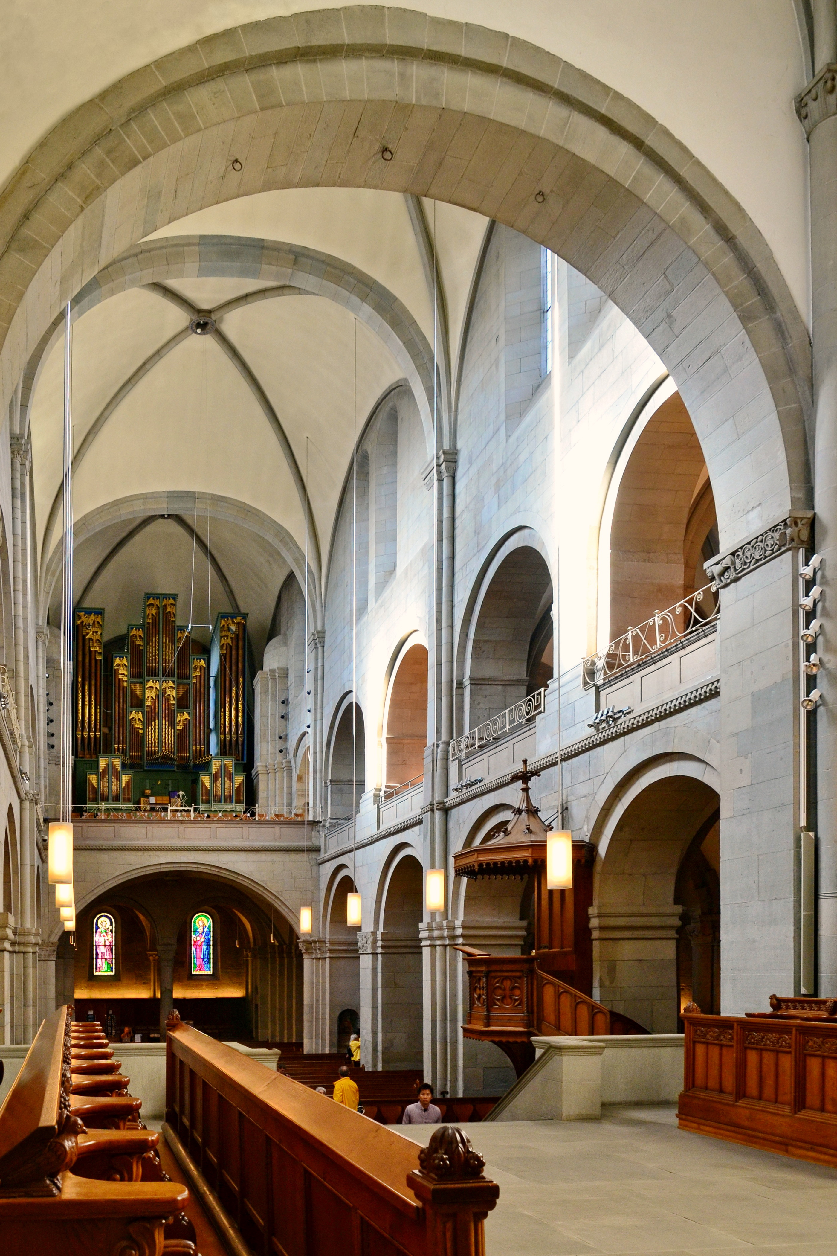 Reformiertes Grossmünster mit Kreuzgang